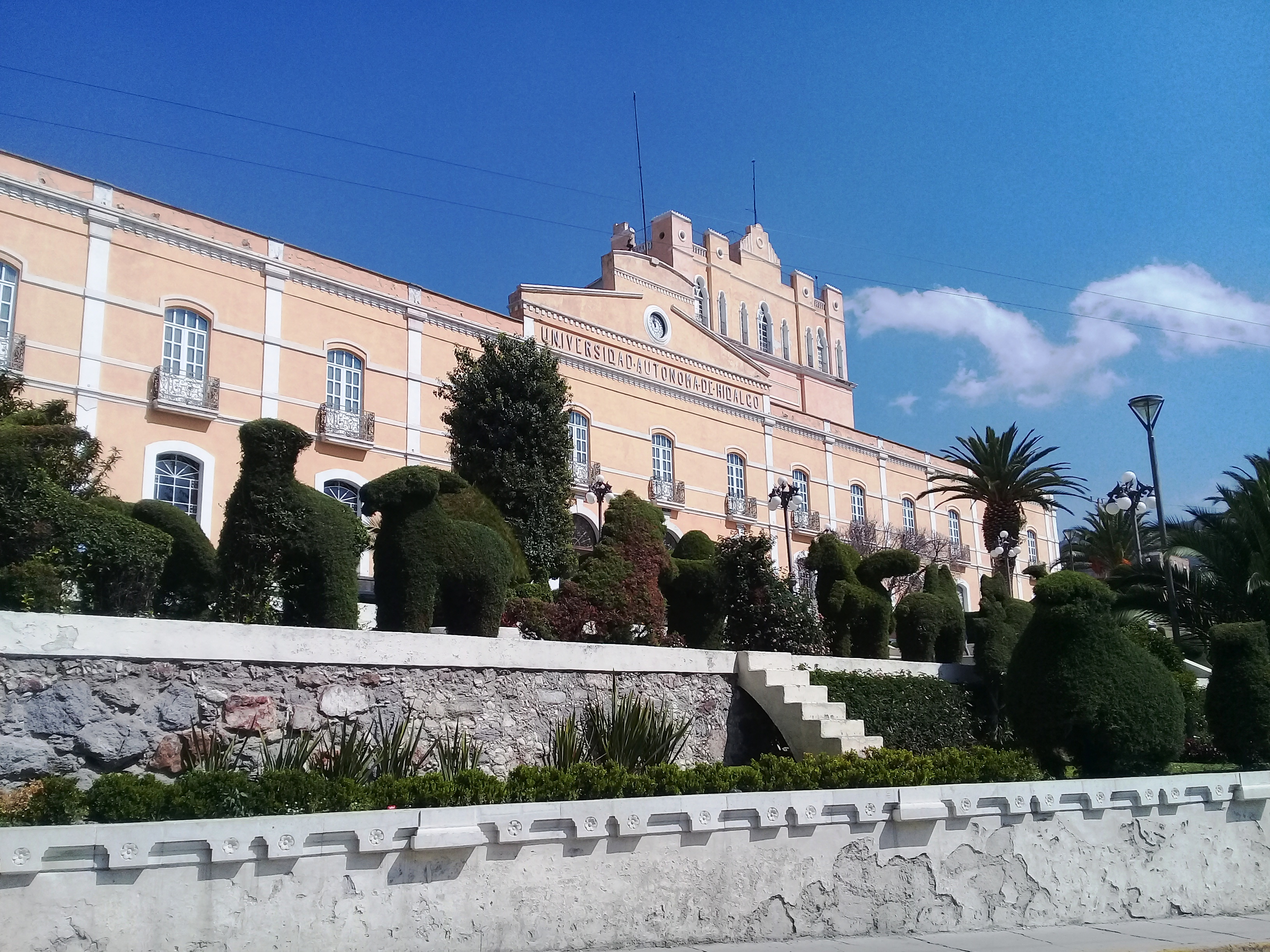 Edificio central UAEH, Pachuca.